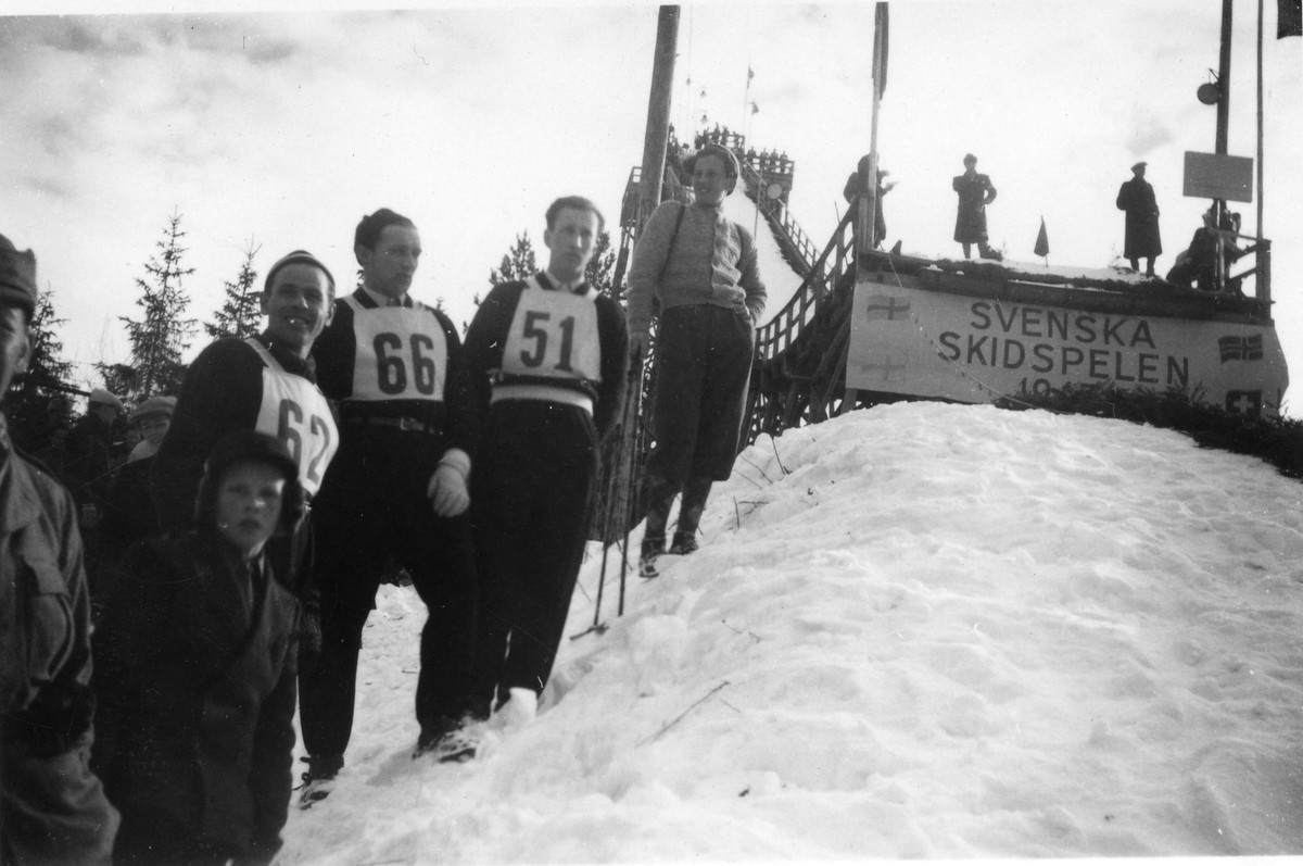 Ski jumpers at Svenska Skidspelen in Östersund. No. 62 Vidar Lindboe-Hansen, no. 51 Arne Hoel, both from Norway.